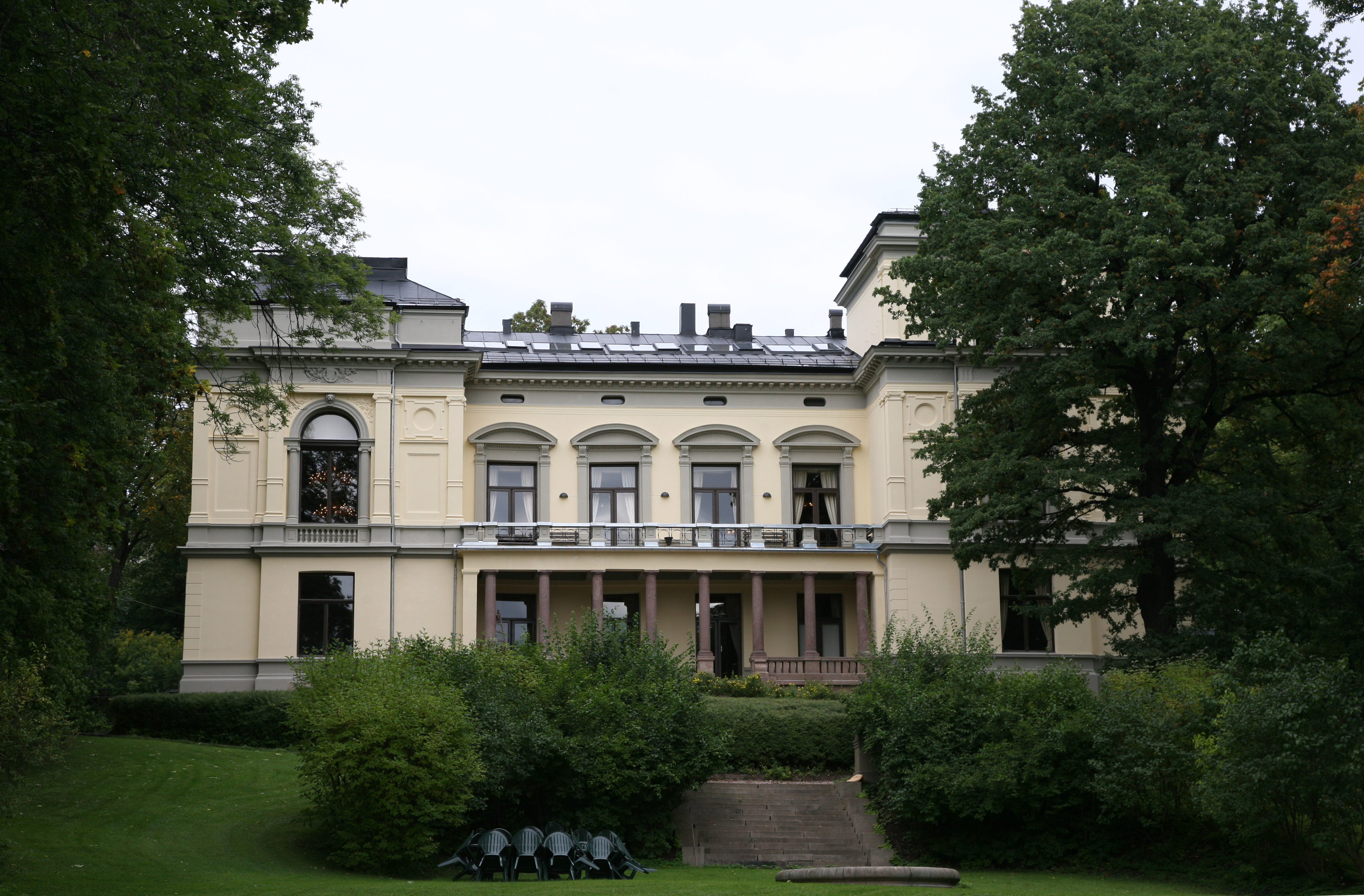 The building of Det Norske Videnskaps-Akademi in Drammensveien 78 in Oslo